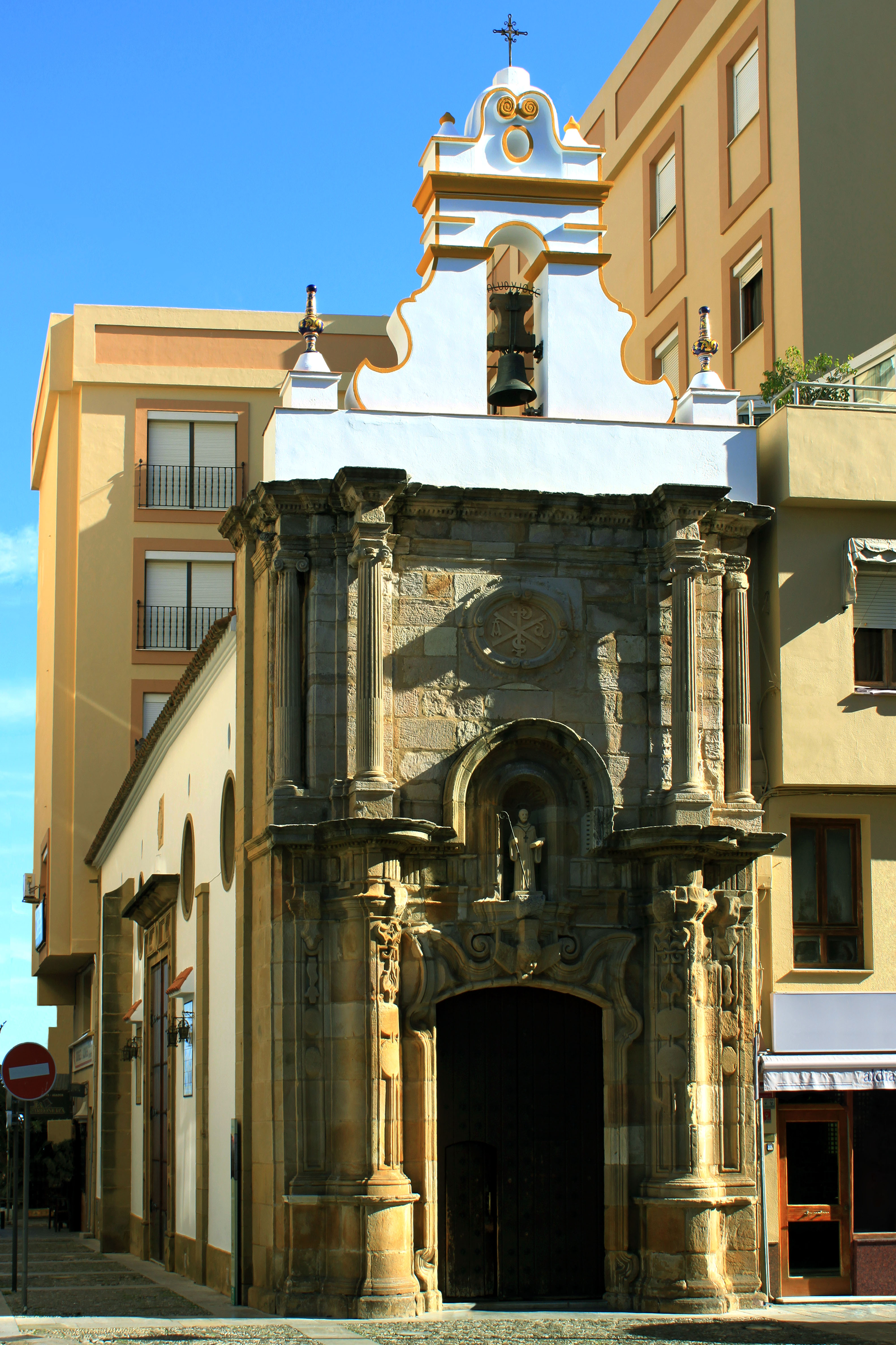 Vista de la Capilla de Nuestra Señora de Europa situada en la Plaza Alta de Algeciras, España.